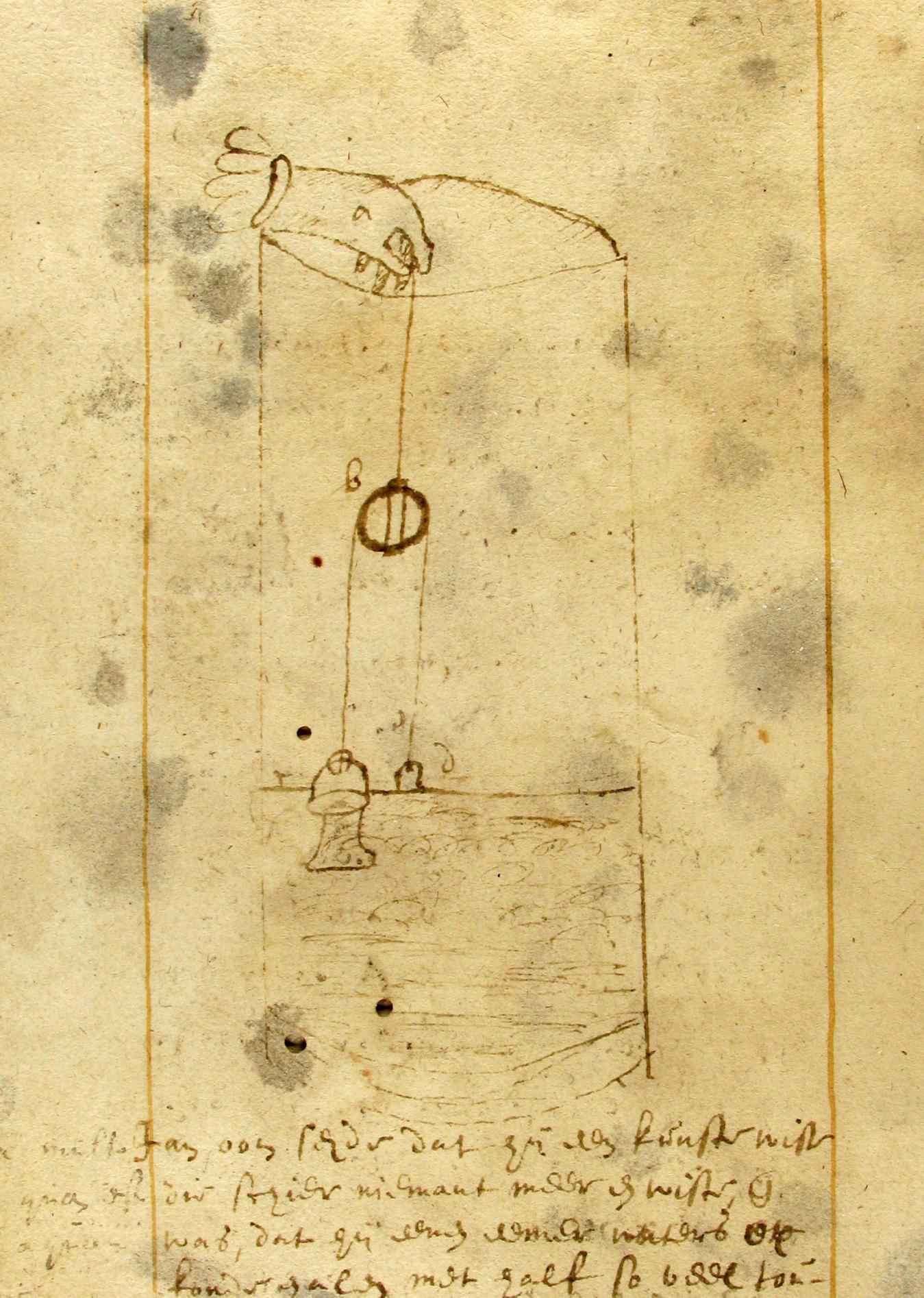 Jan oom seyde, dat hy een kunste wist, die schier niemant meer en wiste ende was, dat hy eenen eemer waters op konde halen met half soveel tou